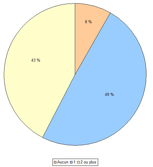 Nombre de véhicules automobiles, par foyer, à Couzon (Allier, France).